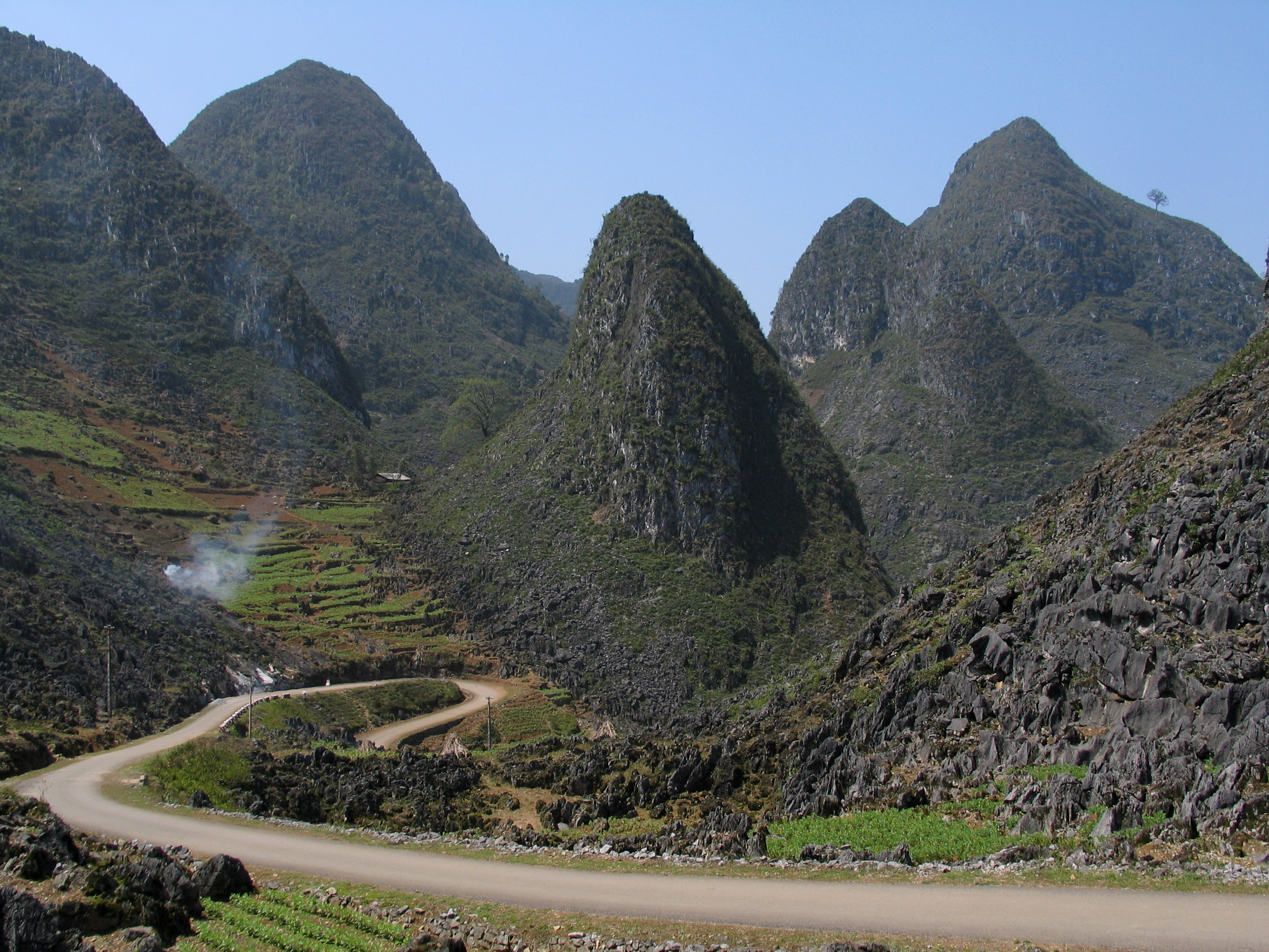 The Ma Pi Leng Pass between Dong Van and Meo Vac